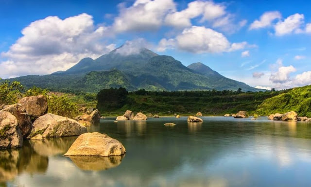 Gambar ranu manduro dokumen